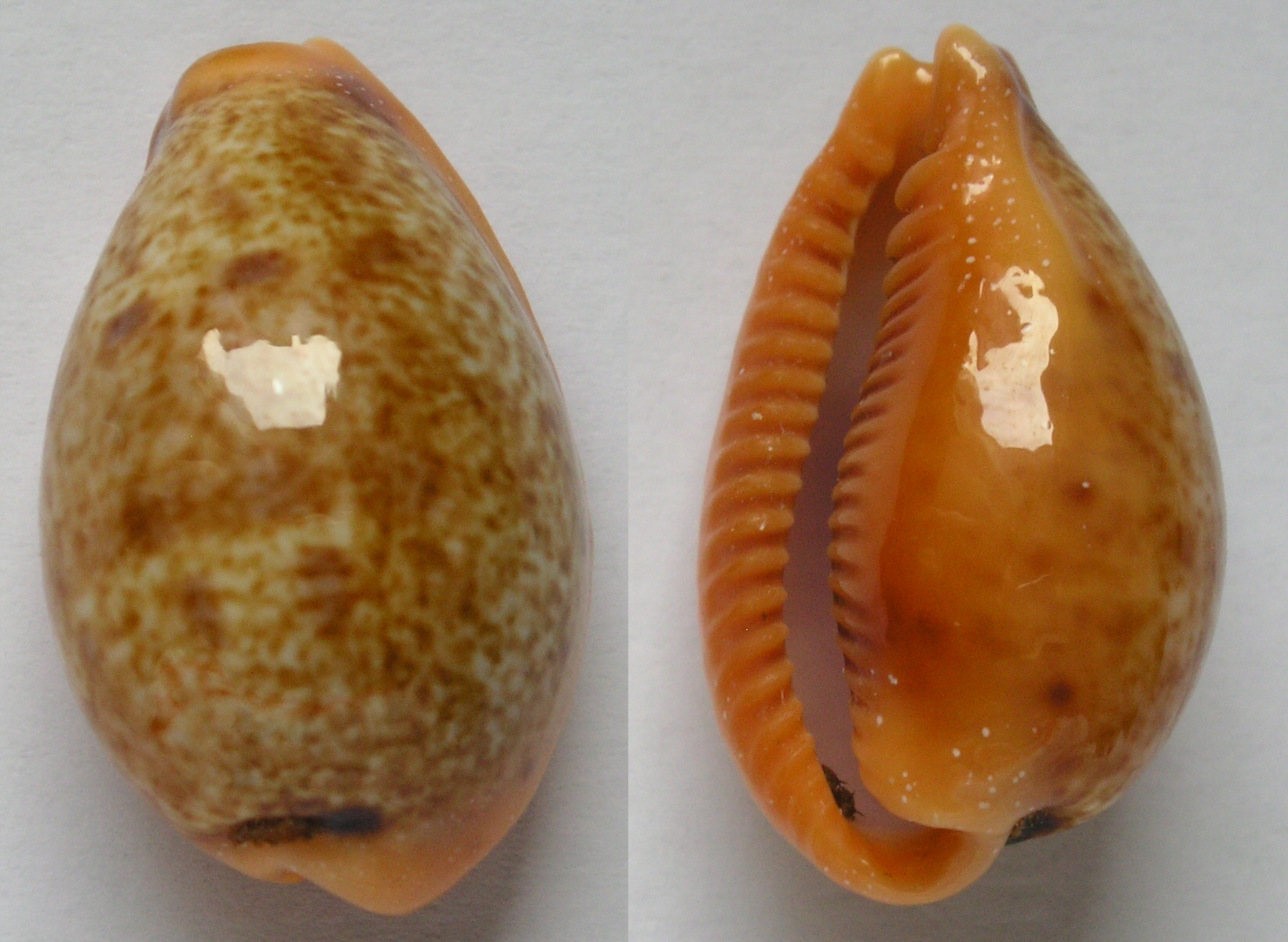 Cypraea bregeriana